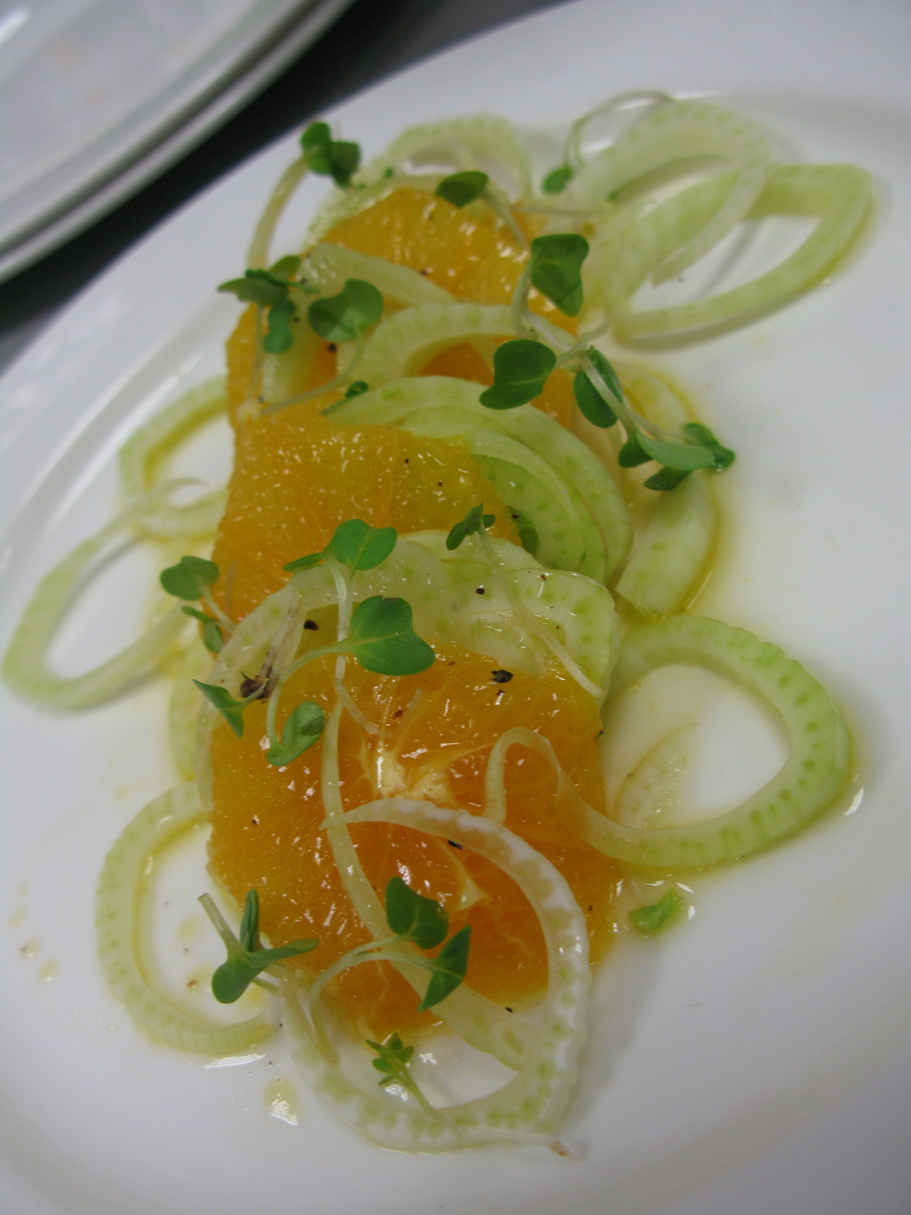 Fennel and orange salad